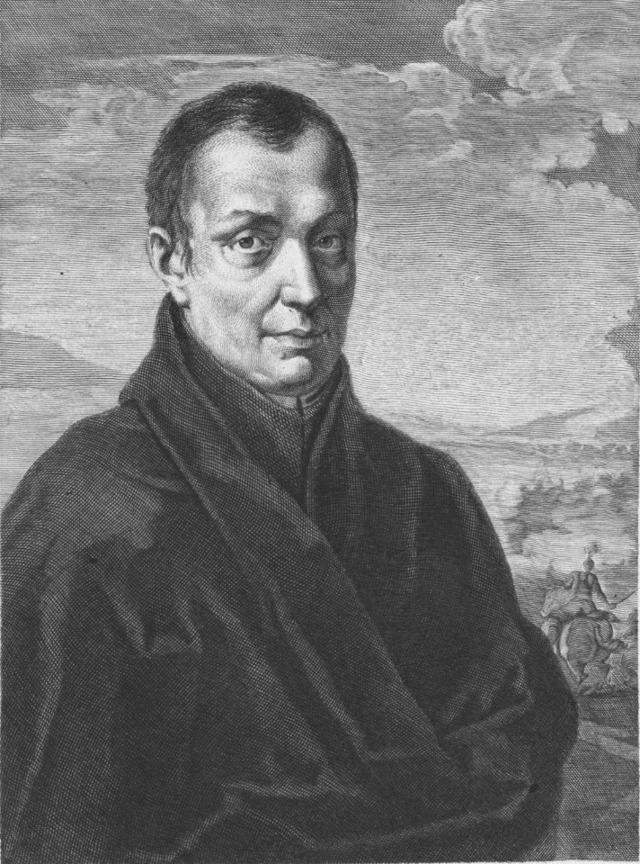 Portrait des Malers Jacques Courtois